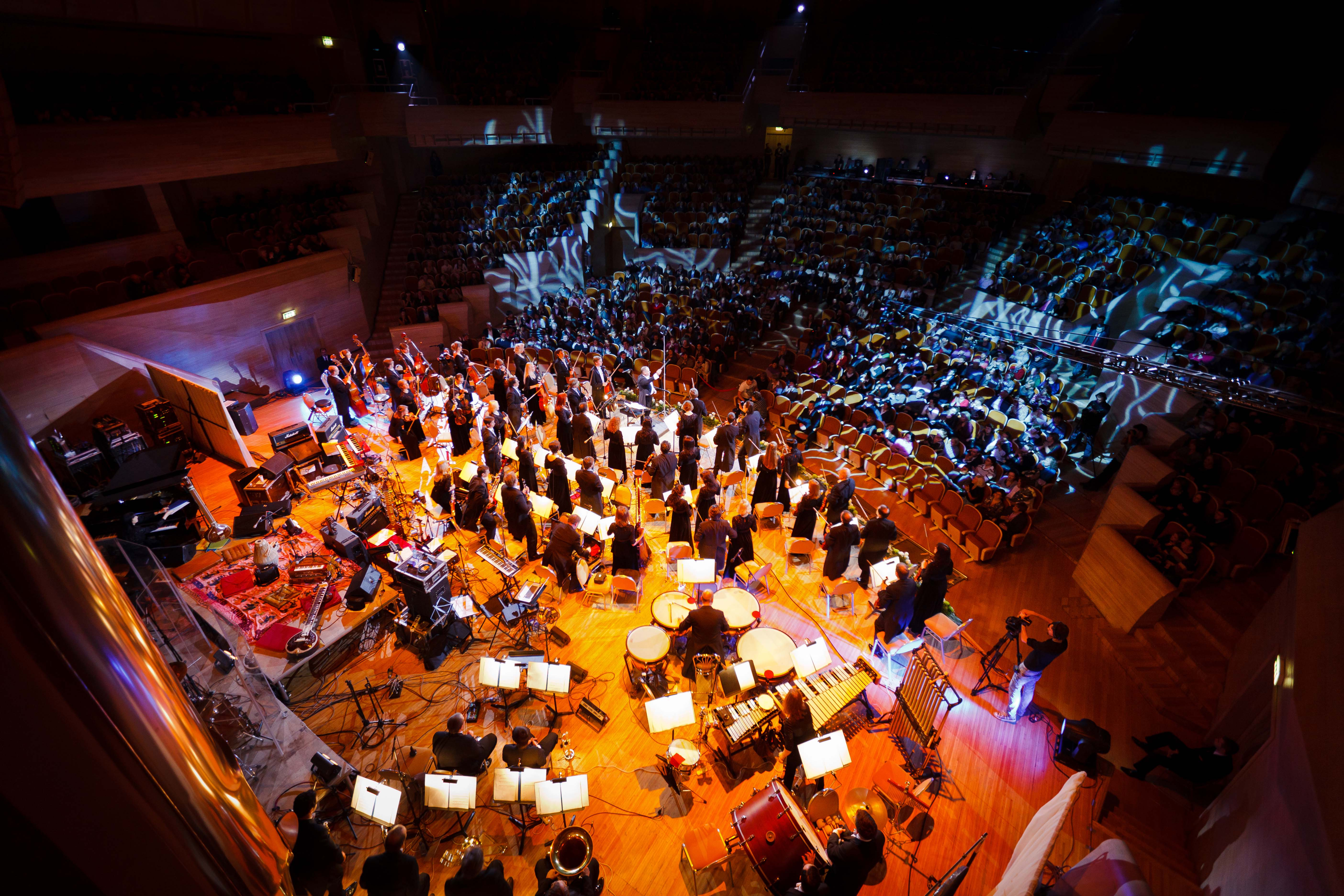 Концерт в Московском доме музыки. Сюита Намина «Осень в Петербурге».